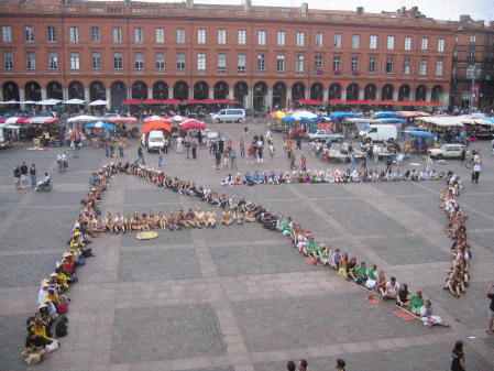 A7, le logo de l'ENSIACET sur la place du Capitole, à Toulouse.